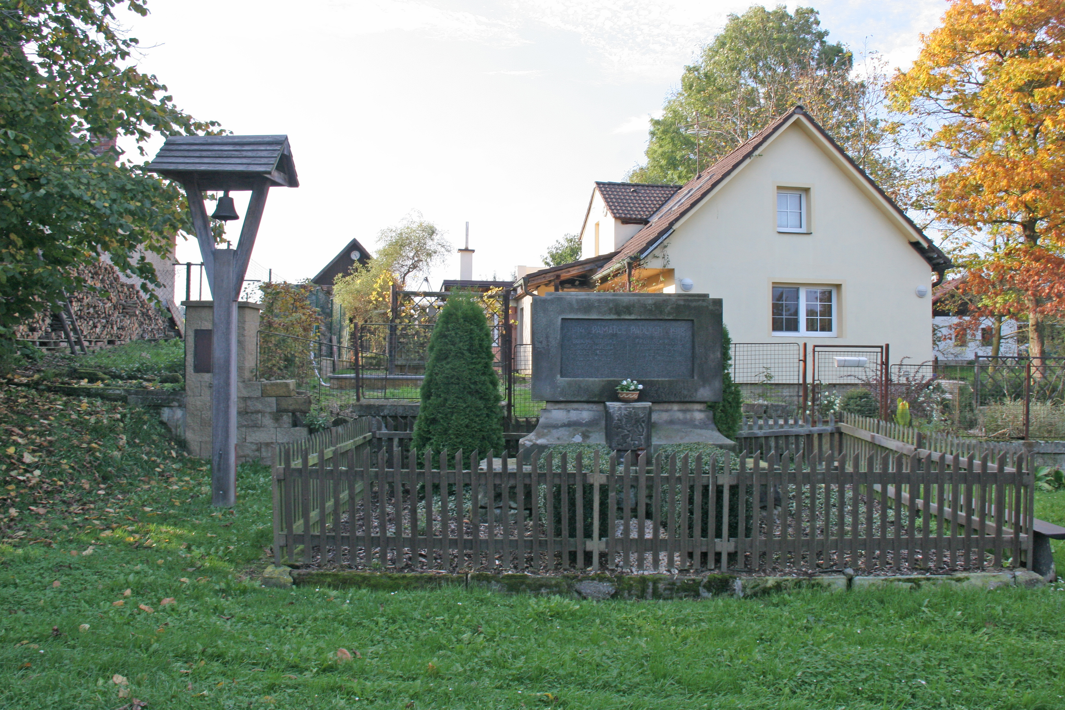 Křelina pomník padlých